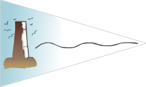 Grímpola del Real Club Náutico de Adra